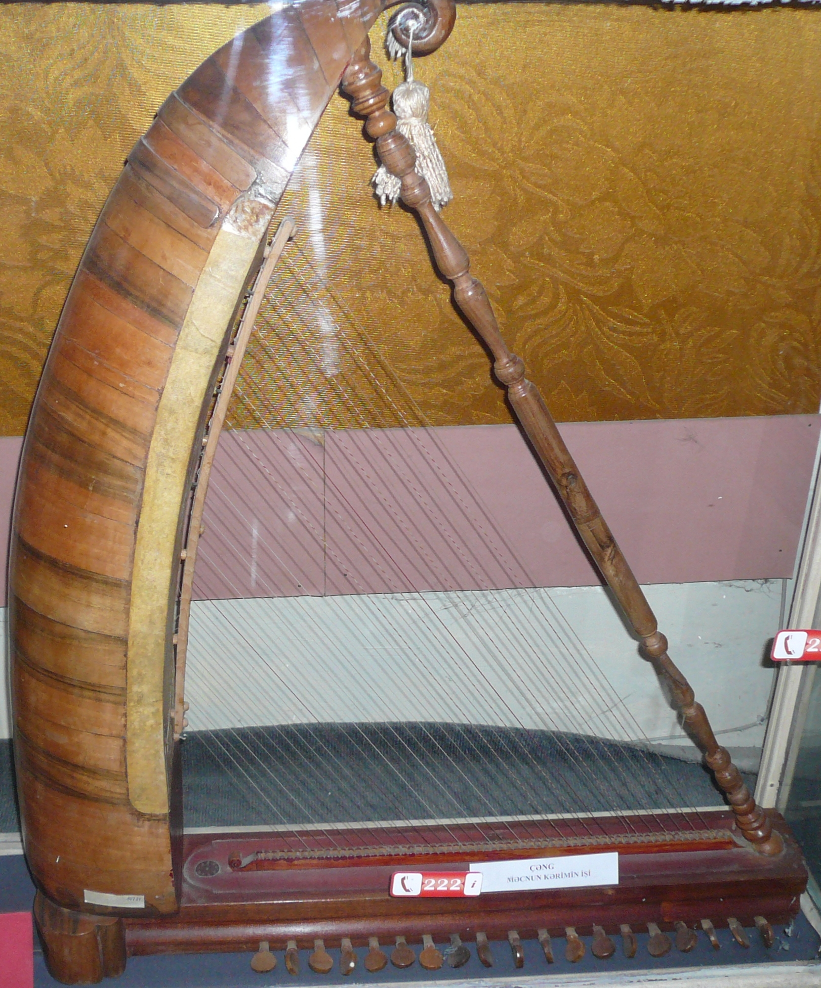 Чанг. Музей музыкальный инструментов. Баку, Азербайджан